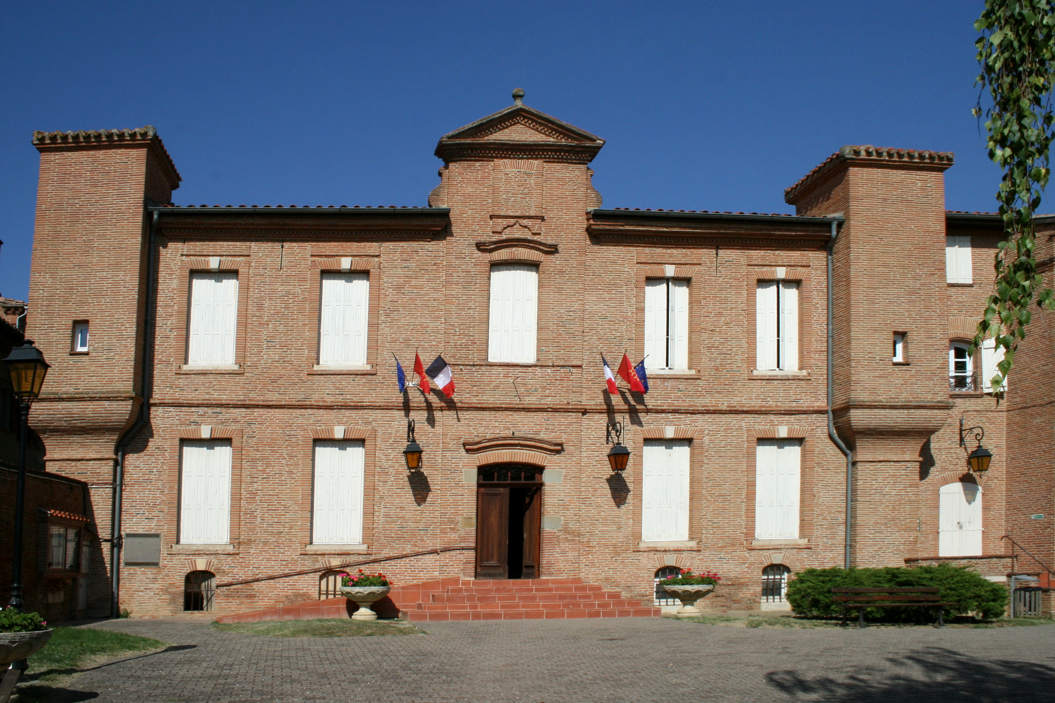 Mairie de Montesquieu-Lauragais